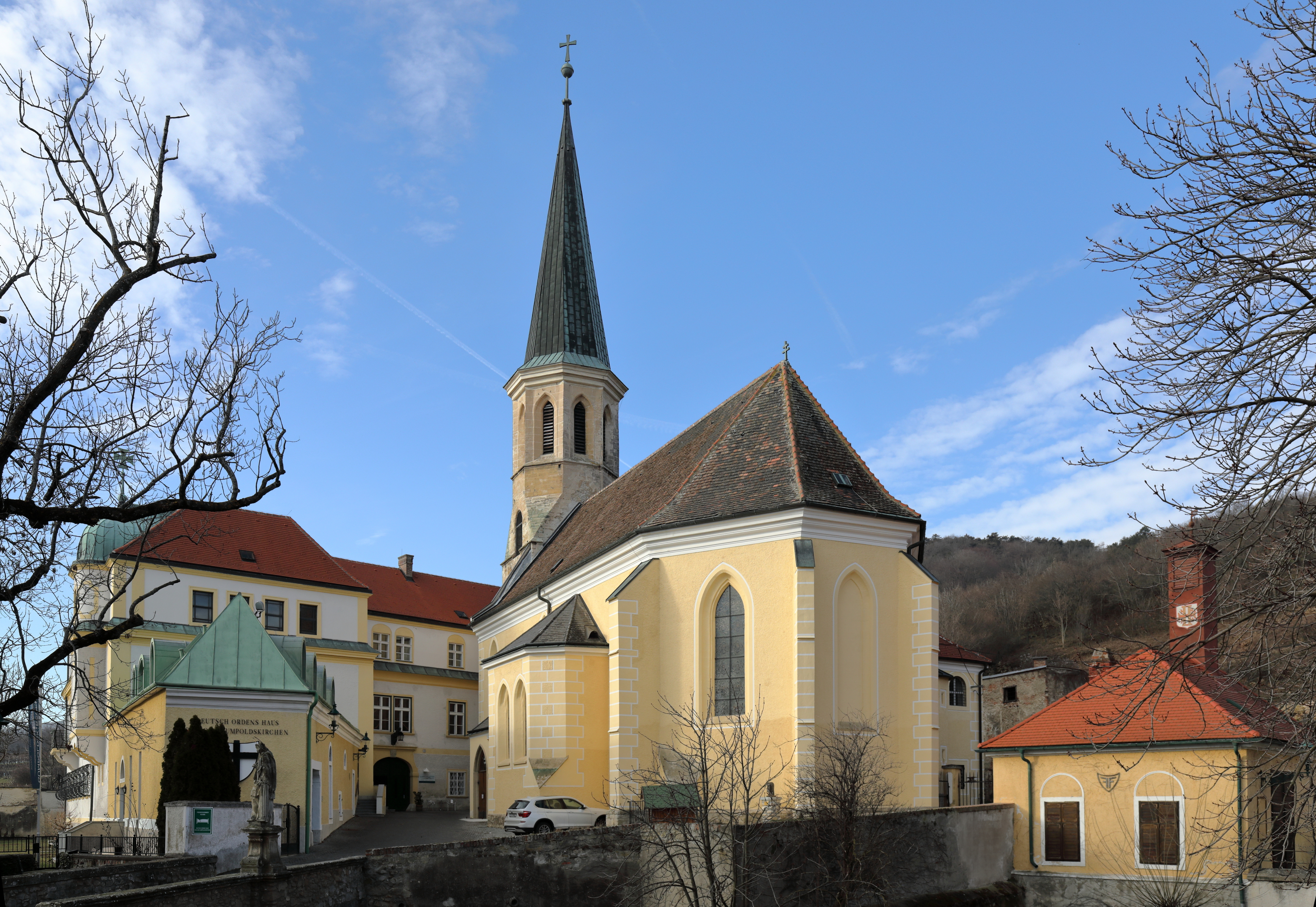 Ostansicht der röm.-kath. Pfarrkirche hl. Michael in der niederösterreichischen Marktgemeinde Gumpoldskirchen sowie links das Deutschordens-Schloss und rechts das ehemalige Zeughaus der Freiwilligen Feuerwehr.